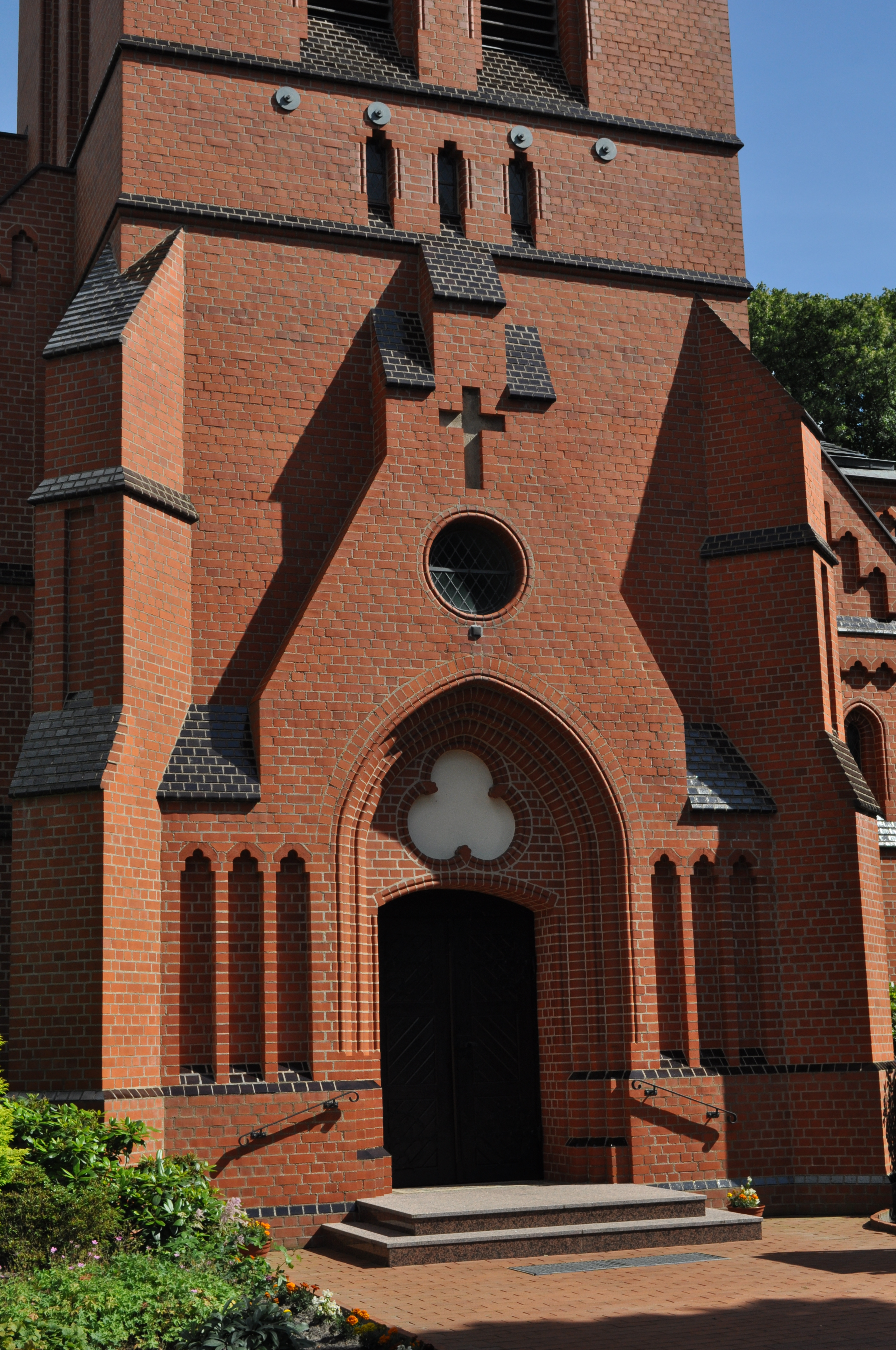 Portal der Christuskirche in Hemmoor-Warstade. This is a photograph of an architectural monument. .202.200.017